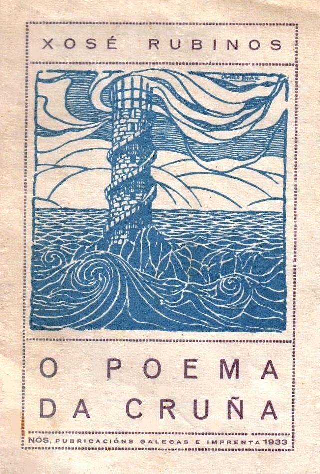 O poema da Cruña de Xosé Rubinos Ramos, Santiago de Compostela, Editorial Nós, 1933